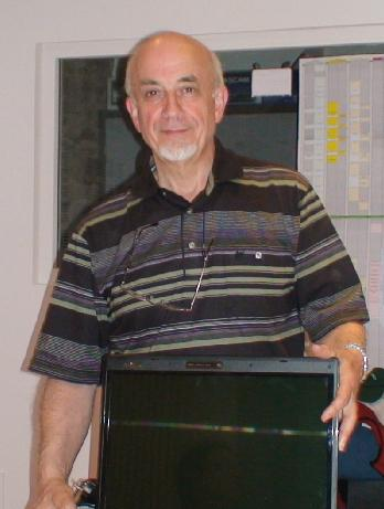 Jef Fulup deuet da Di ar Vro Treger ha Goueloù.